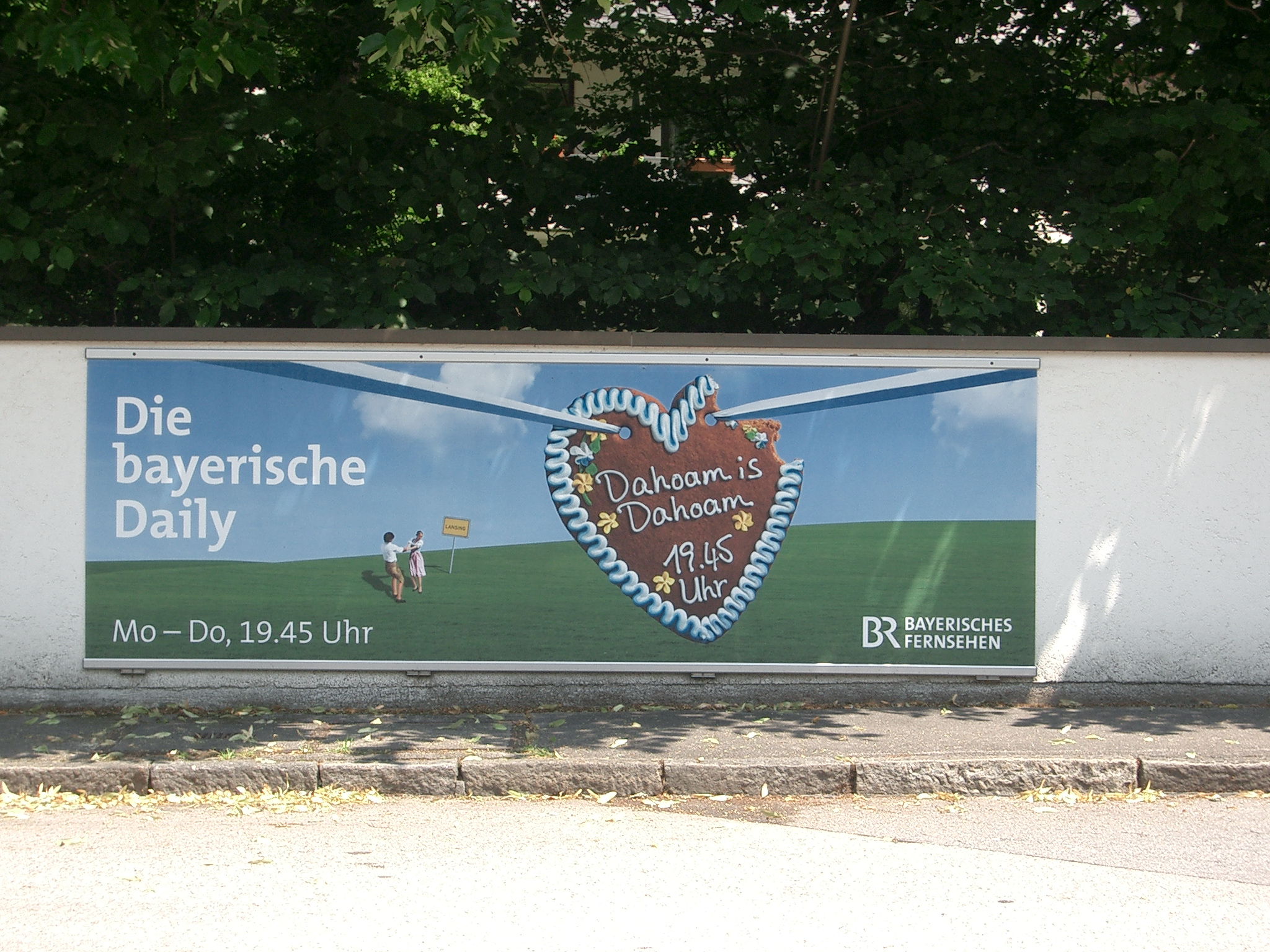 Dahoam is Dahoam - Werbeplakat an der Einfahrt des Bayerischen Fernsehens, Floriansmühlstraße 60 in München